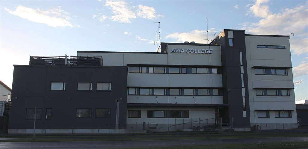 Avia College on Vantaan Aviapoliksen suuralueen Lentokentän kaupunginosassa toimiva, valtiollisen Finavian lentokenttä- ja lennonvarmennusalan oppilaitos. (Kuvan rakennuksen katuosoite: Tietotie 14, Vantaa)